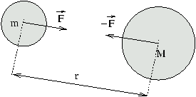 La loi de la gravitation universelle.